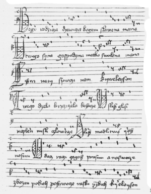 Ceci est un vieux manuscrit du chant polonais Bogurodzica. Image empruntée au wiki anglais Bogurodzica par ADM. L'utilisateur:Emax l'avait d'abord téléchargée en novembre 2004 et il a déclaré que l'image était sous domaine public.